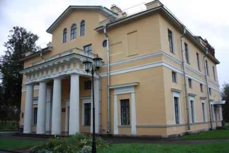 Богадельня (Инвалидный дом) князей Куракиных. В здании находится Дом Детского Творчества "Павловский"